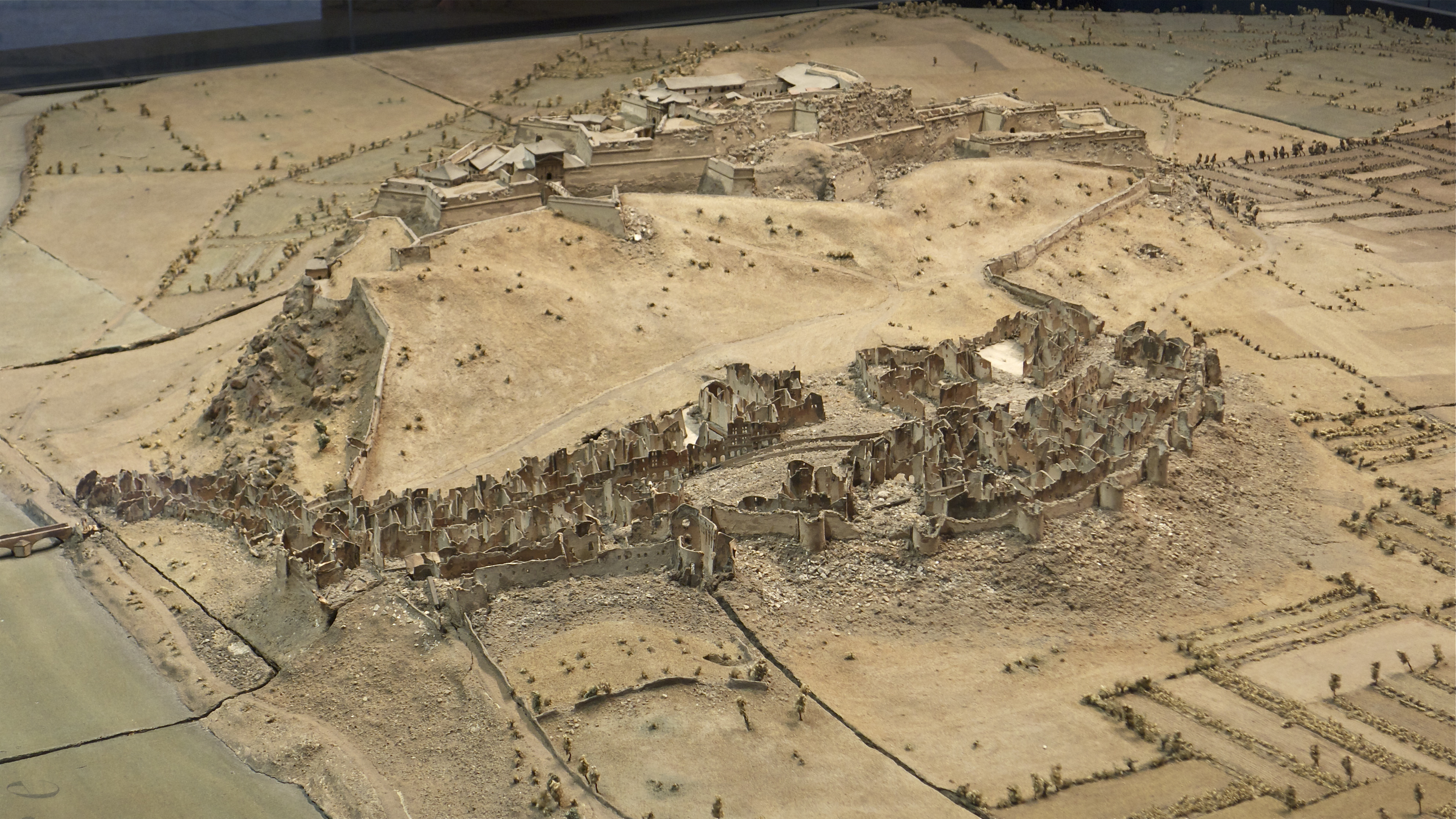 Plan-relief de Montmélian après sa prise par les Français en 1691 Plan-relief construit en 1693. Échelle 1/600e